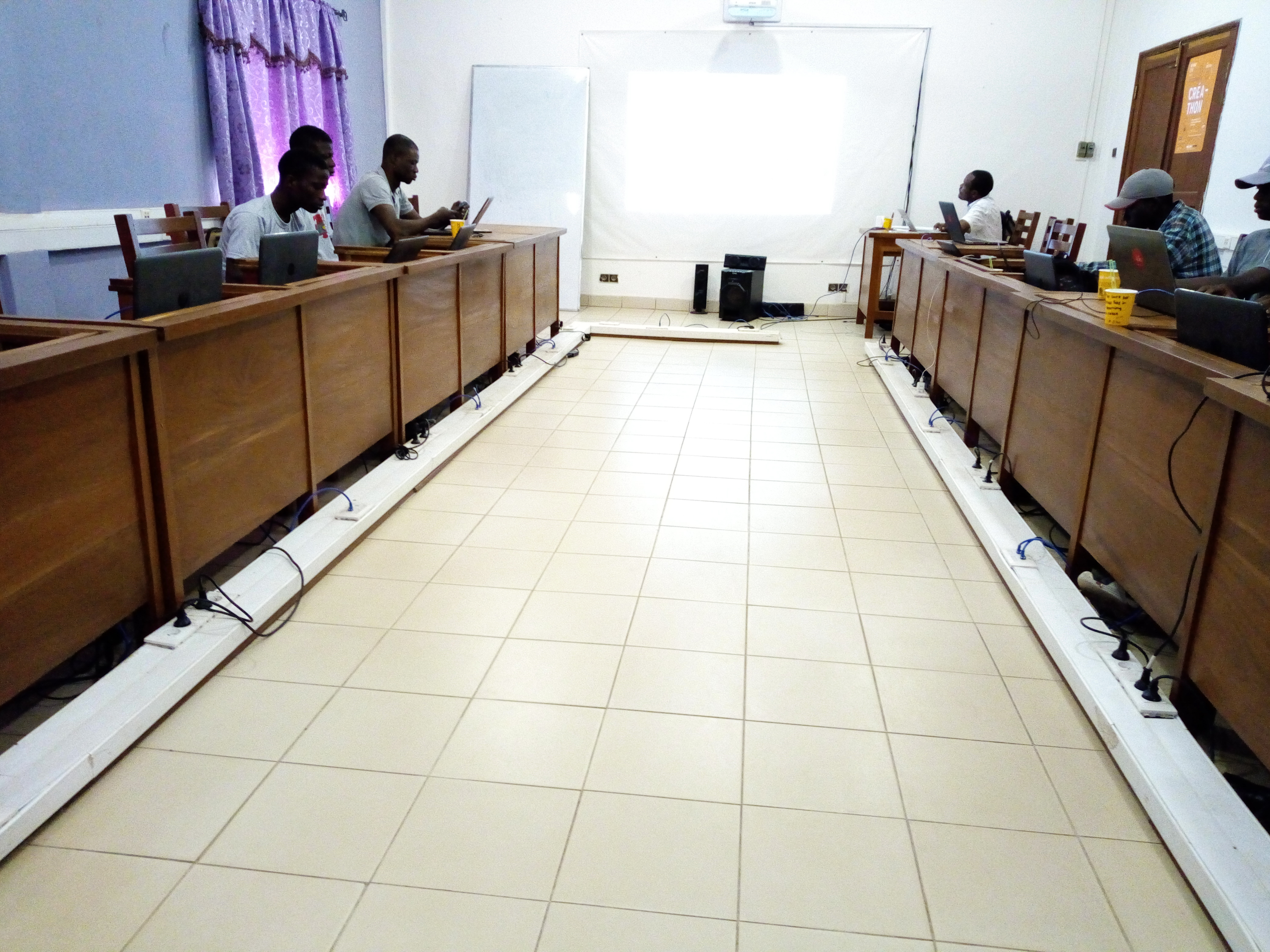 Atelier du 05 mars 2019 Edition articles et téléversement de photos pour wiki loves Africa 2019 au Bénin au Campus numérique francophone de l' Université d'Abomey-Calavi .....